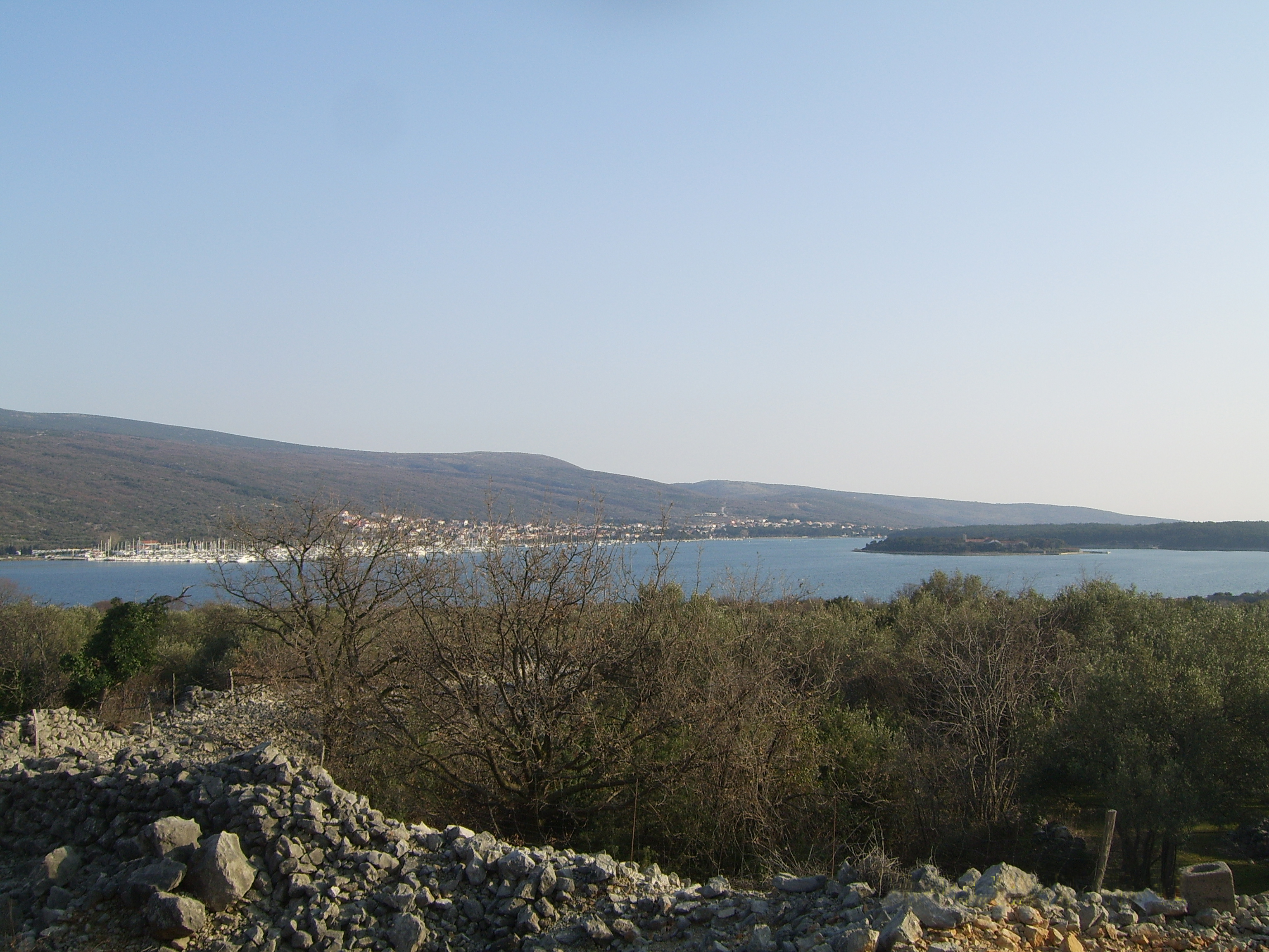 Punat i Puntarska draga slikani iz susjednog sela Kornića. Desno se vidi otočić Košljun, a iza njega poluotok Prniba koji zatvara Puntarsku dragu